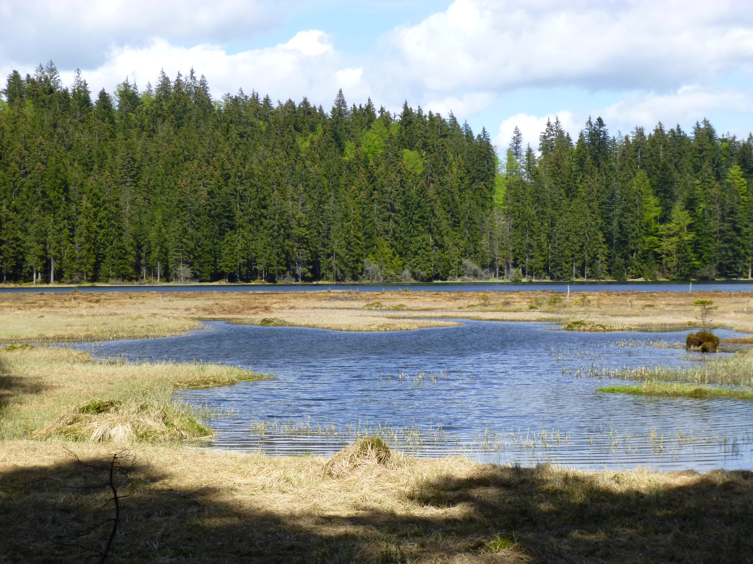 Blick über den Großen Arbersee im Bereich der Arberseewand. Der große Arbersee kann auf einem Wanderweg umrundet werden. Er gehört zu den Naturschutzgebieten im Landkreis Regen mit der Nr. NSG-00021.01